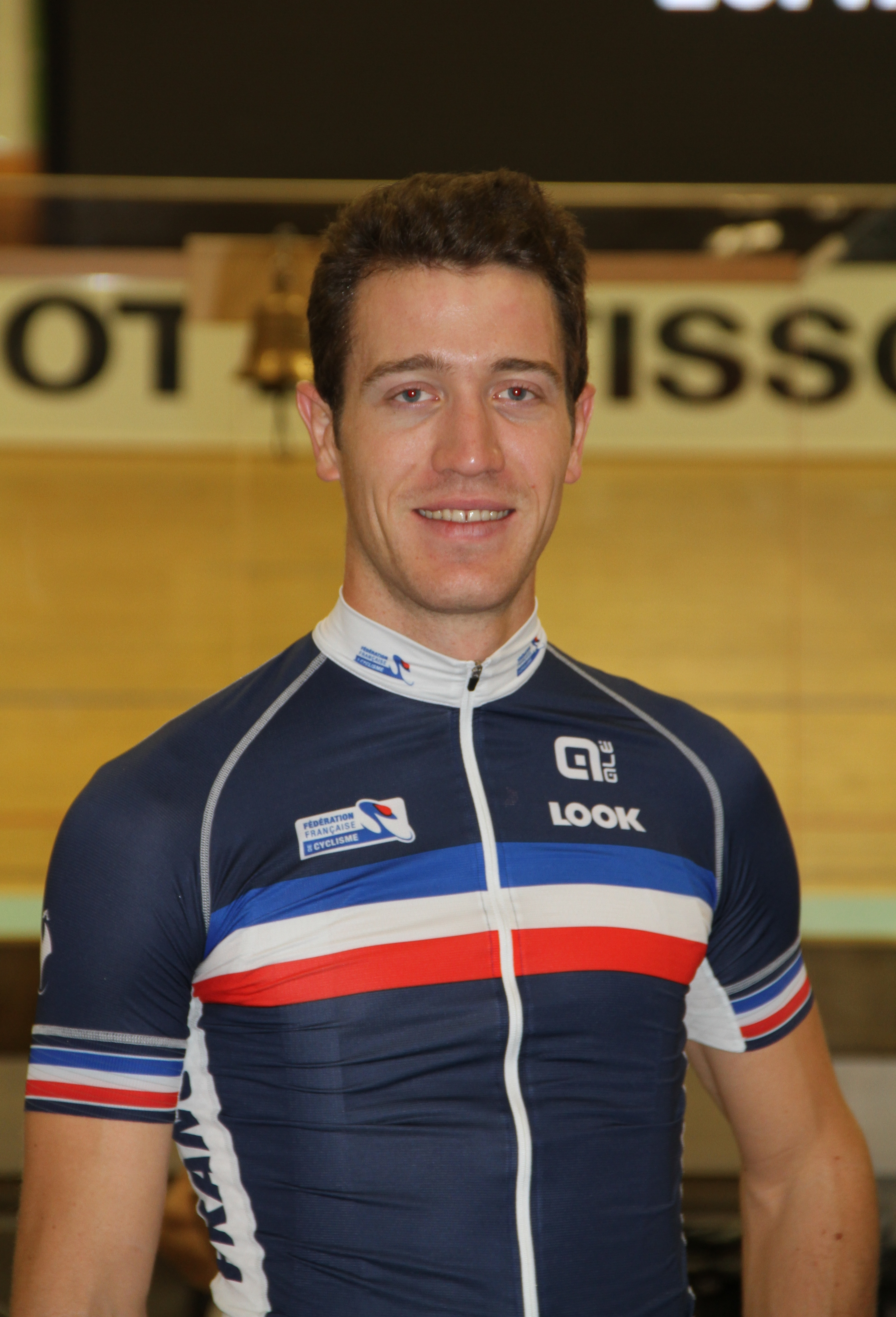 Julien Morice, französischer Radsportler The making of this document was supported by the Community-Budget of Wikimedia Germany.